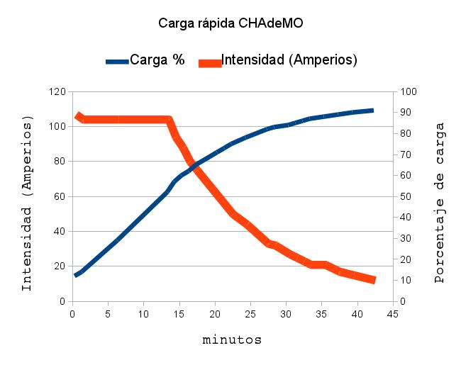 Gráfico que muestra la carga rápida CHAdeMO en un cargador Nissan NSQC442G. Los datos se obtuvieron de la pantalla del cargador observando varias recargas rápidas.